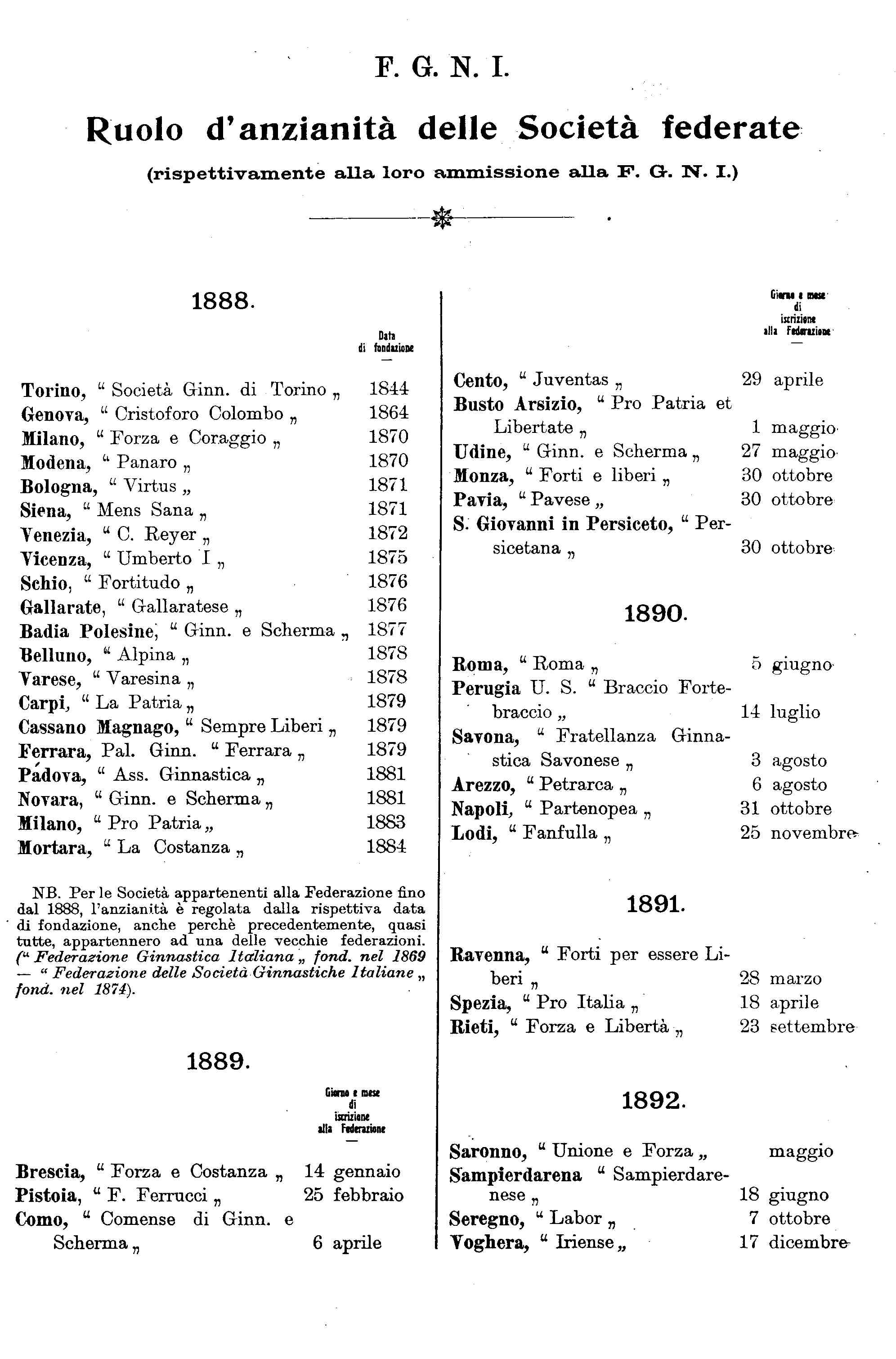 Elenco cronologico delle Società affiliate alla F.G.N.I. nel 1912